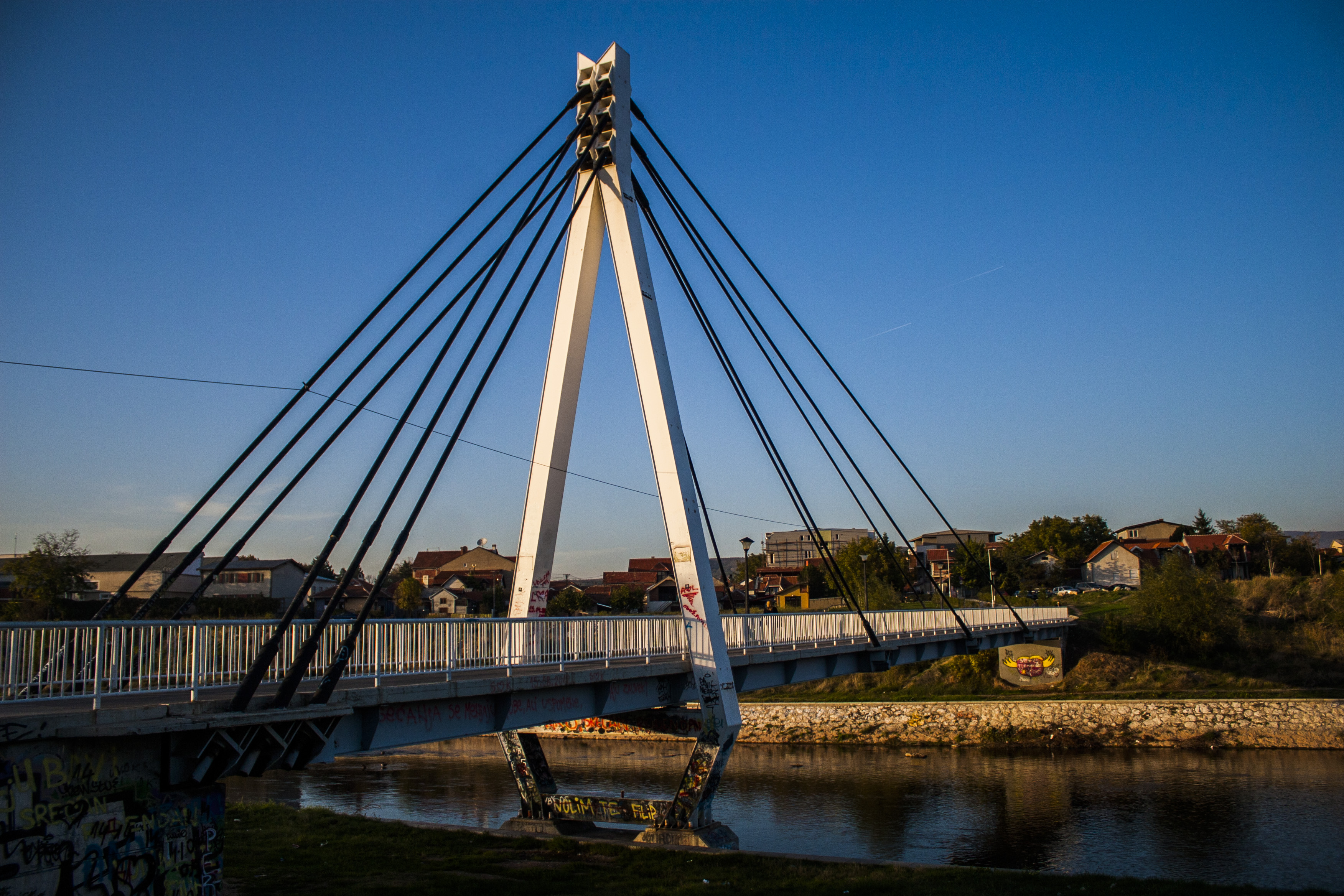 Pešački most